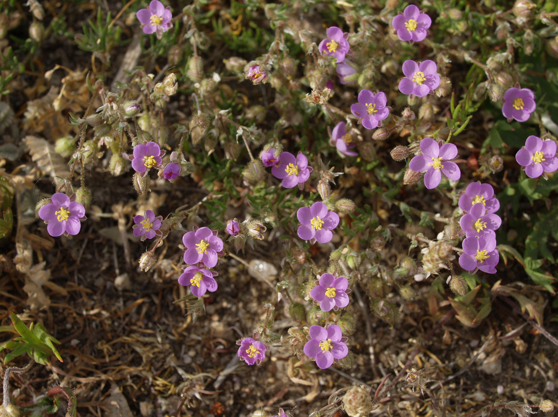 Spergularia rubra. Losar de la Vera, Cáceres, España.